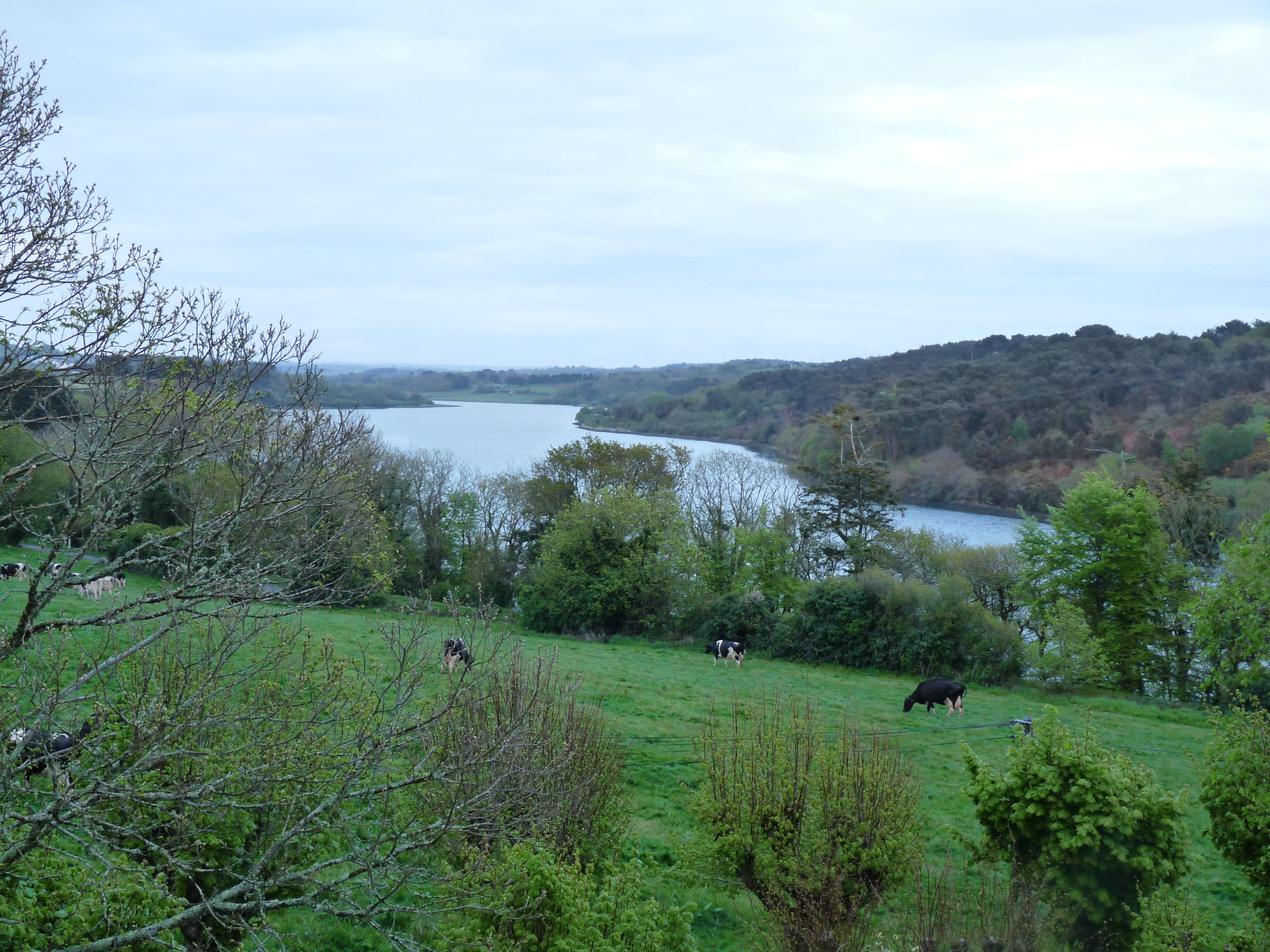 Le Goyen vu du Manoir de Suguensou (19e siècle) sur la commune d'Esquibien (Finistère), transformé en chambres d'hôtes